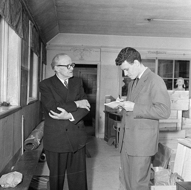 Texas Ljungberg & Per Wästberg i kvarteret Ladugårdsgrinden